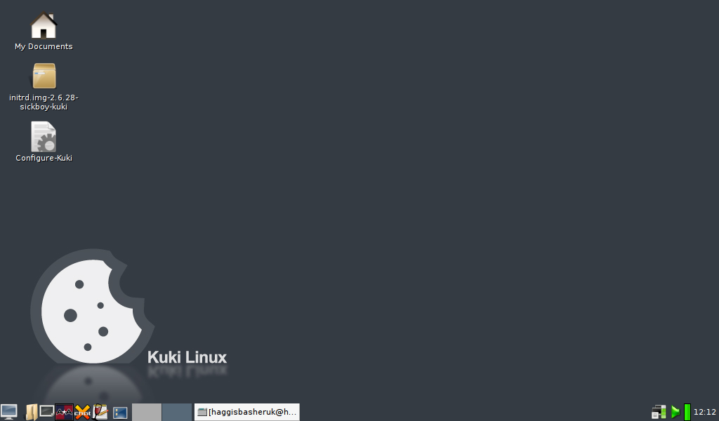 Kuki linux screenshot